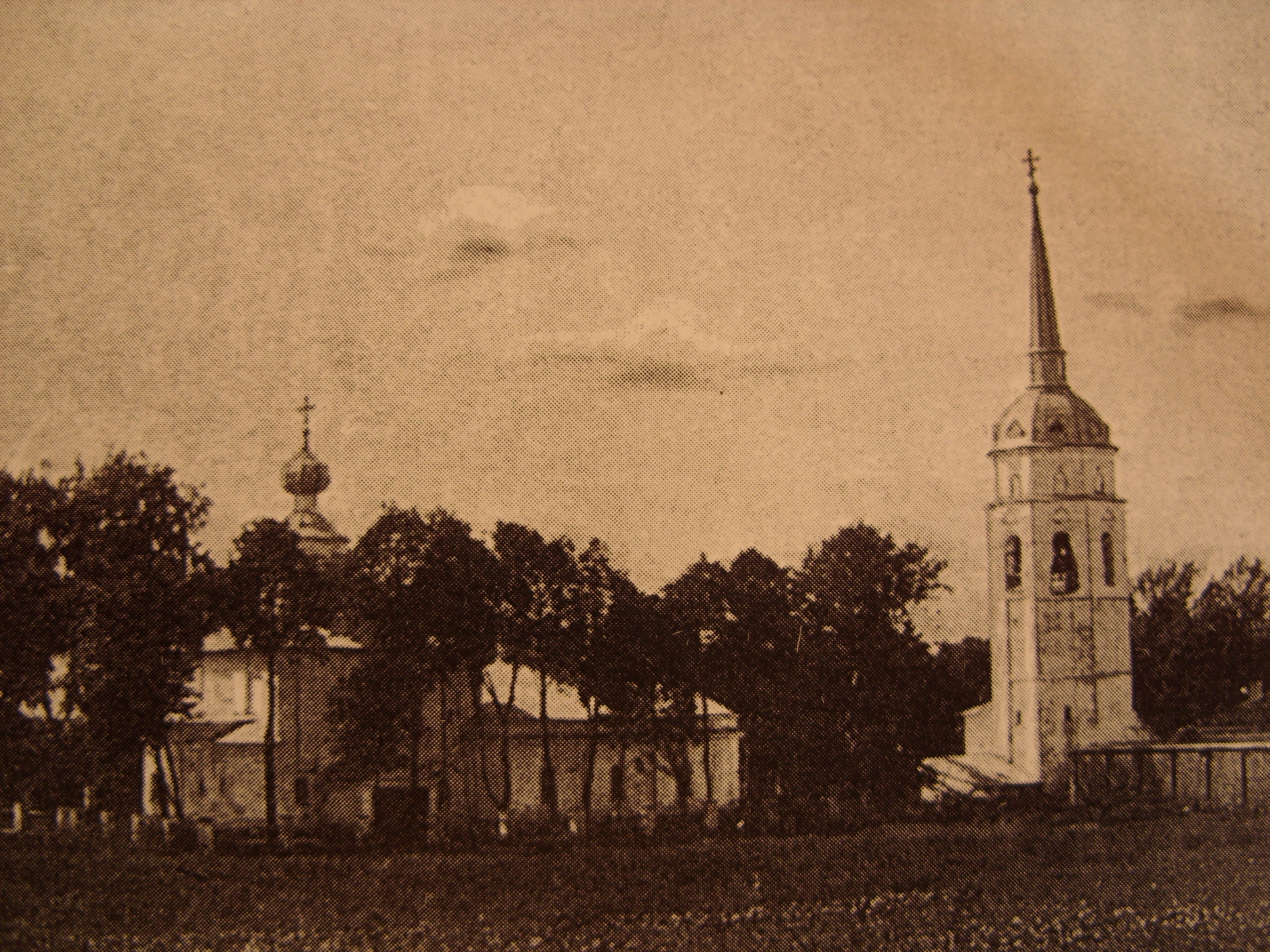 Собор Святого Дмитрия и колокольня